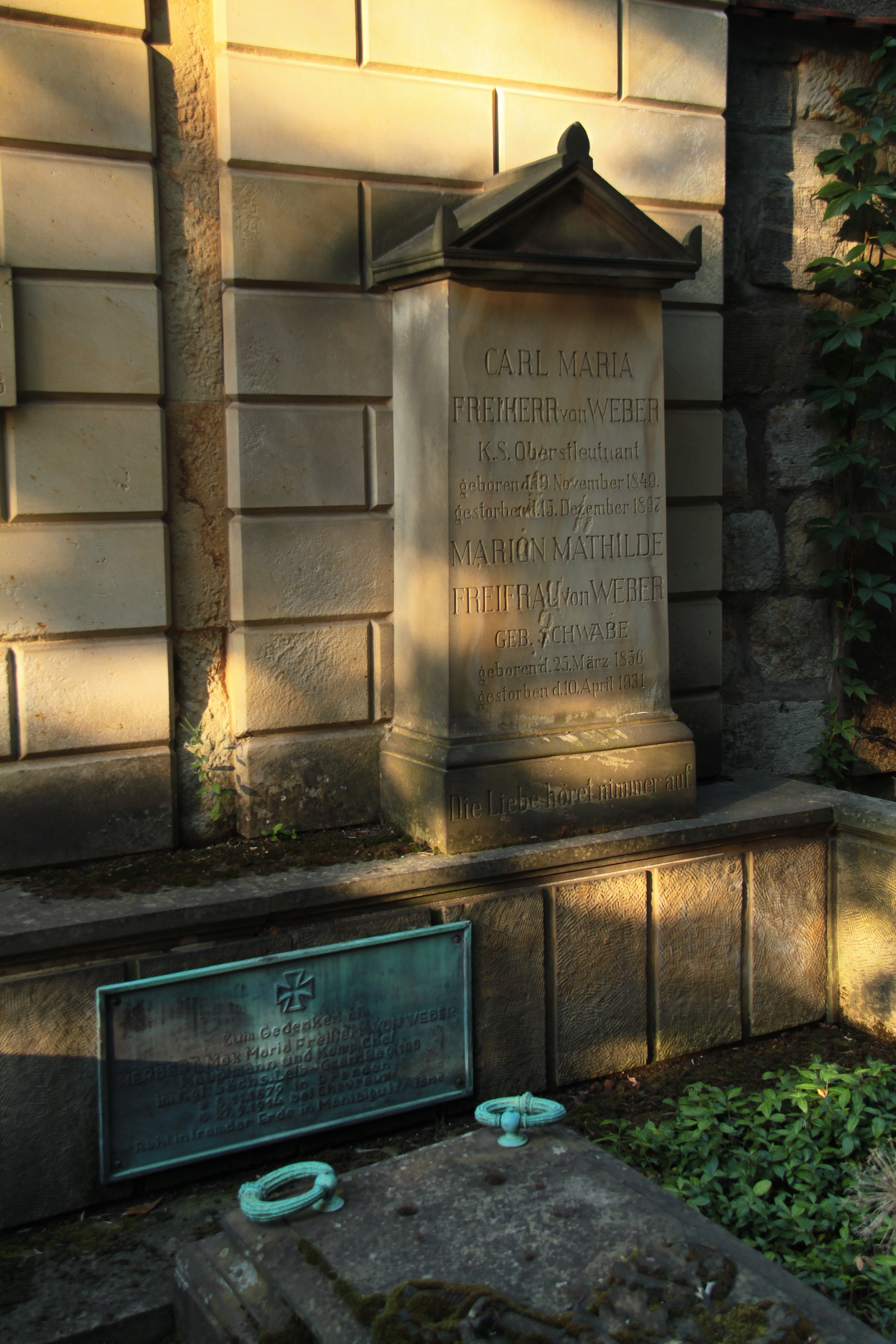 Impressionen alter katholischer Friedhof, Dresden Friedrichstadt This is a photograph of an architectural monument.It is on the list of cultural monuments of Dresden Friedrichstadt